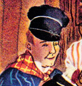 Casquette à pont normande (années 1930)